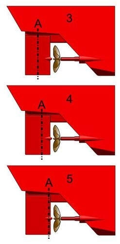 Representación de los diferentes tipos de tipos de timón